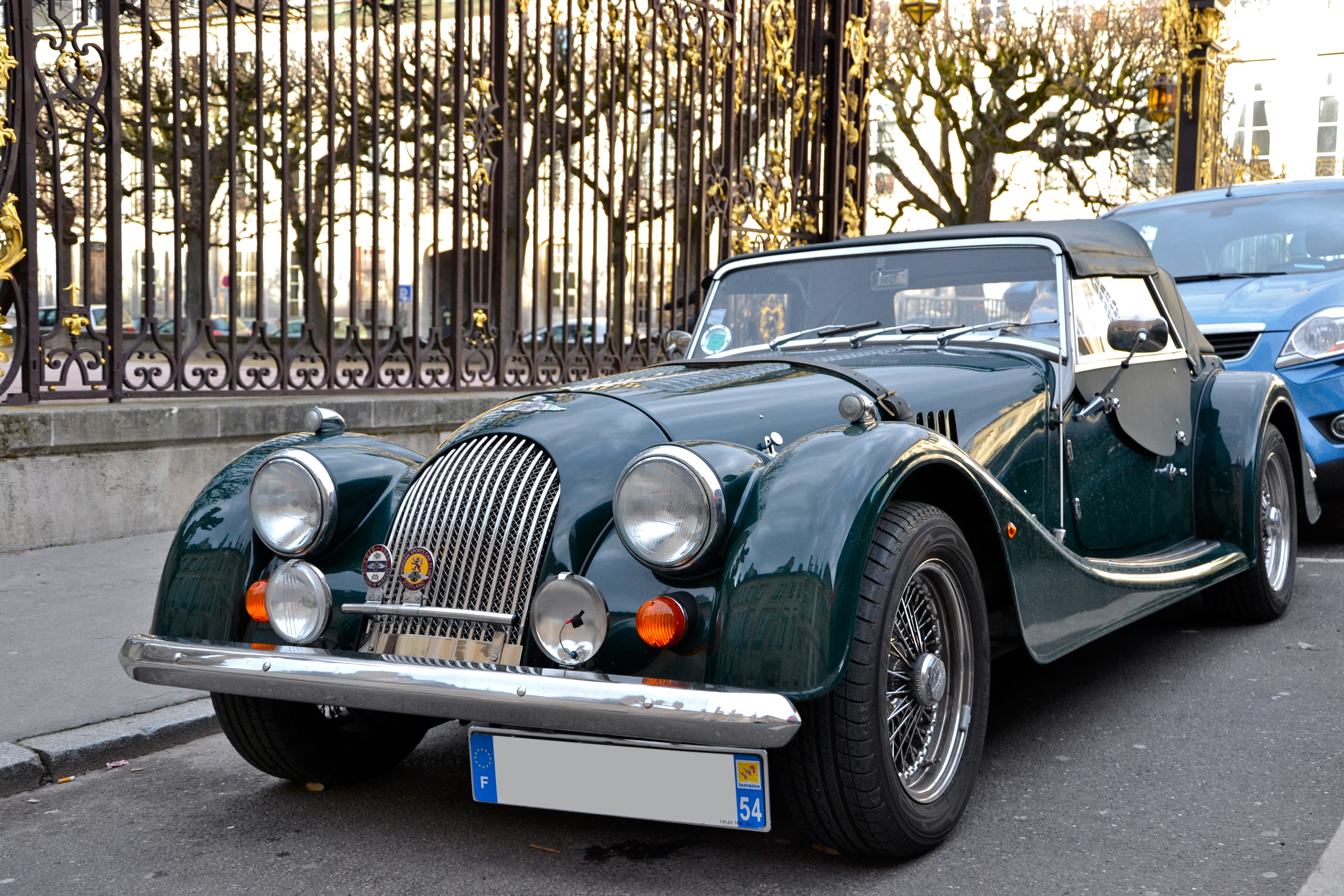 Morgan +4